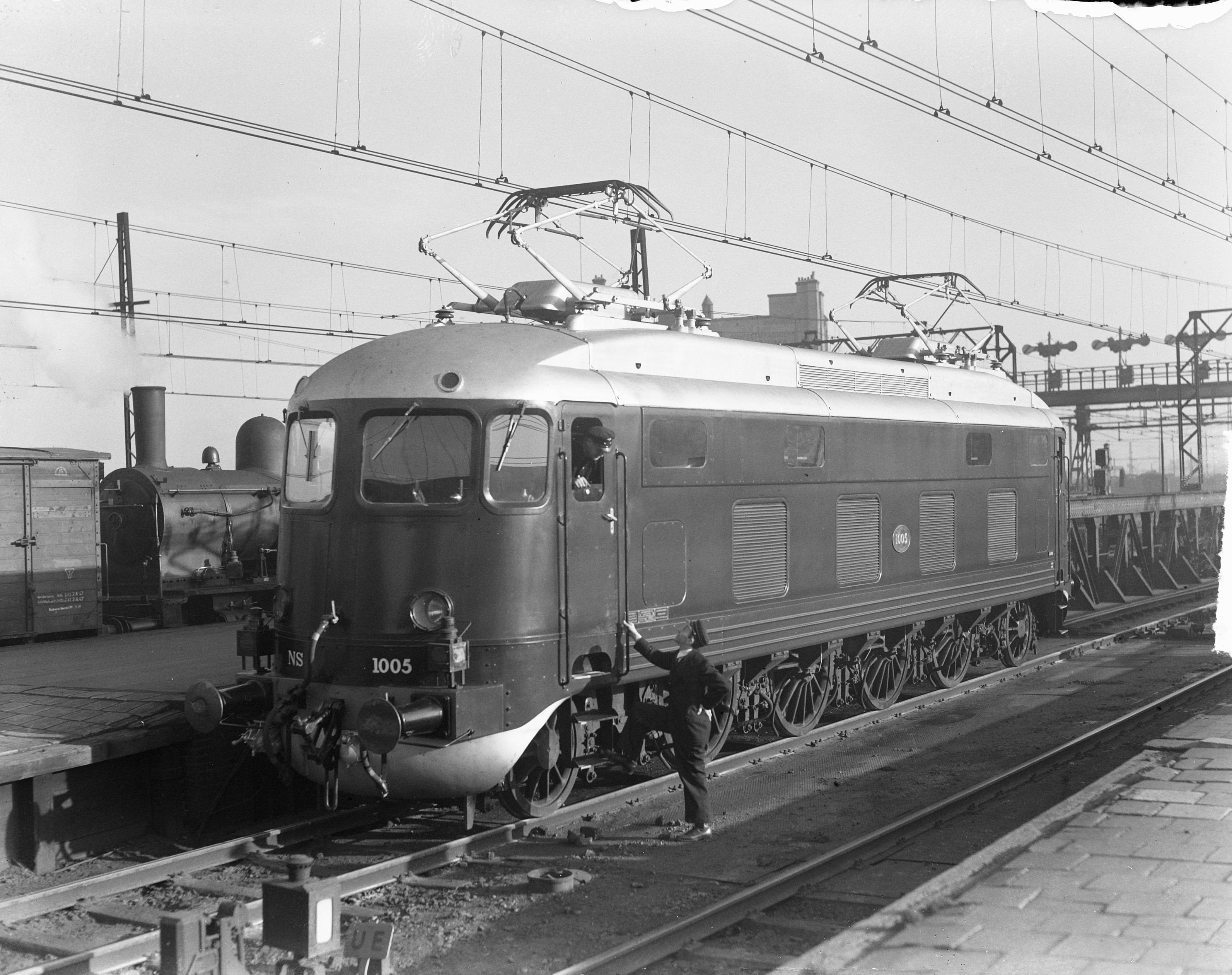 Collectie / Archief : Fotocollectie Anefo Reportage / Serie : [ onbekend ] Beschrijving : In Nederland gebouwde electrische locomotief op het CS Datum : 26 november 1948 Trefwoorden : ELECTRISCHE, locomotieven Fotograaf : Noske, J.D. / Anefo Auteursrechthebbende : Nationaal Archief Materiaalsoort : Glasnegatief Nummer archiefinventaris : bekijk toegang 2.24.01.09 Bestanddeelnummer : 903-1161